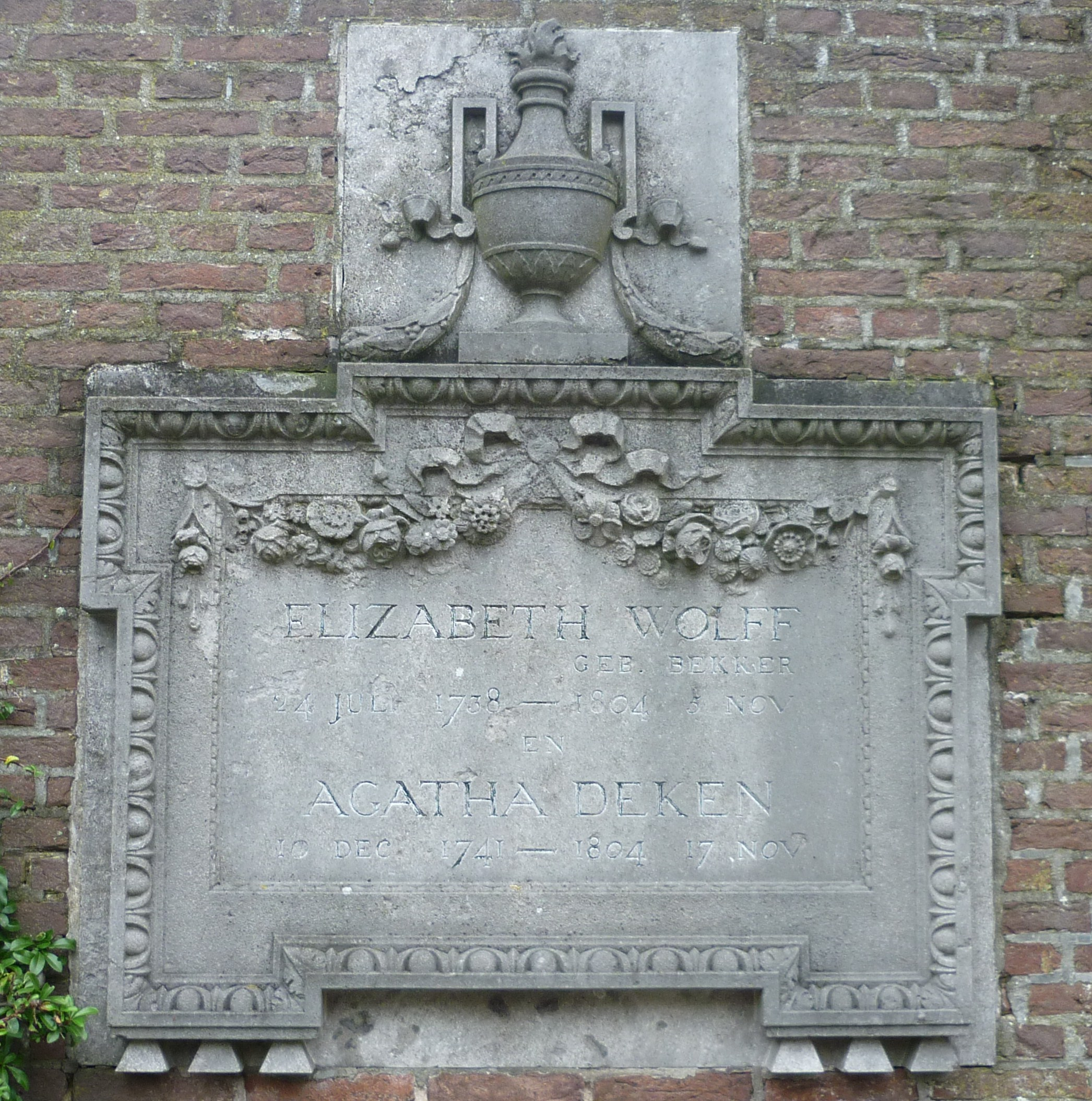 Begraafplaats Ter Navolging in Scheveningen, graf van Betje Wolff en Aagje Deken